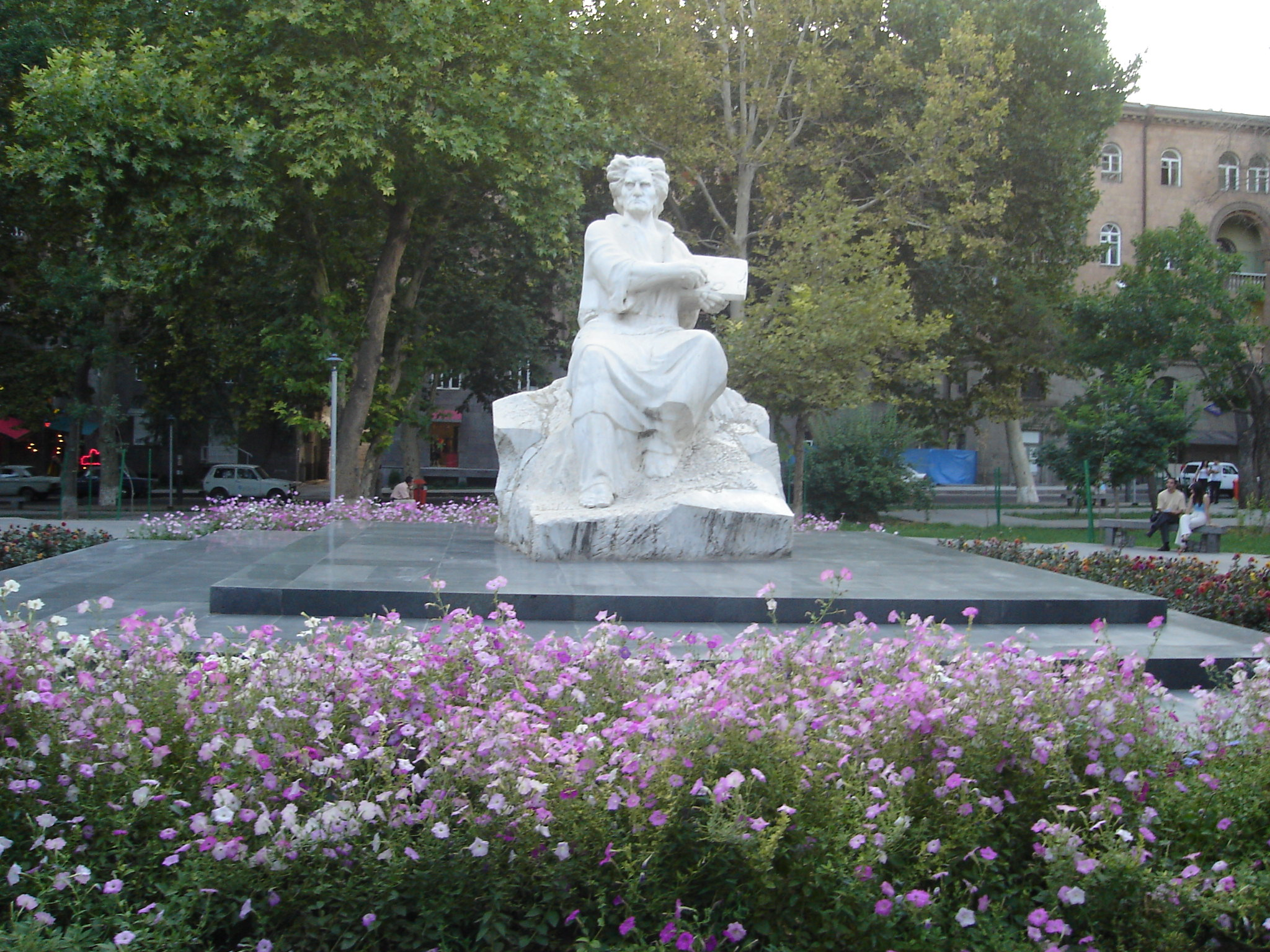 Մարտիրոս Սարյանի հուշարձանը Երևանում, 1986 թ., քանդ.` Լ. Թոքմաջյան, ճարտ.` Ա. Թարխանյան 6/141